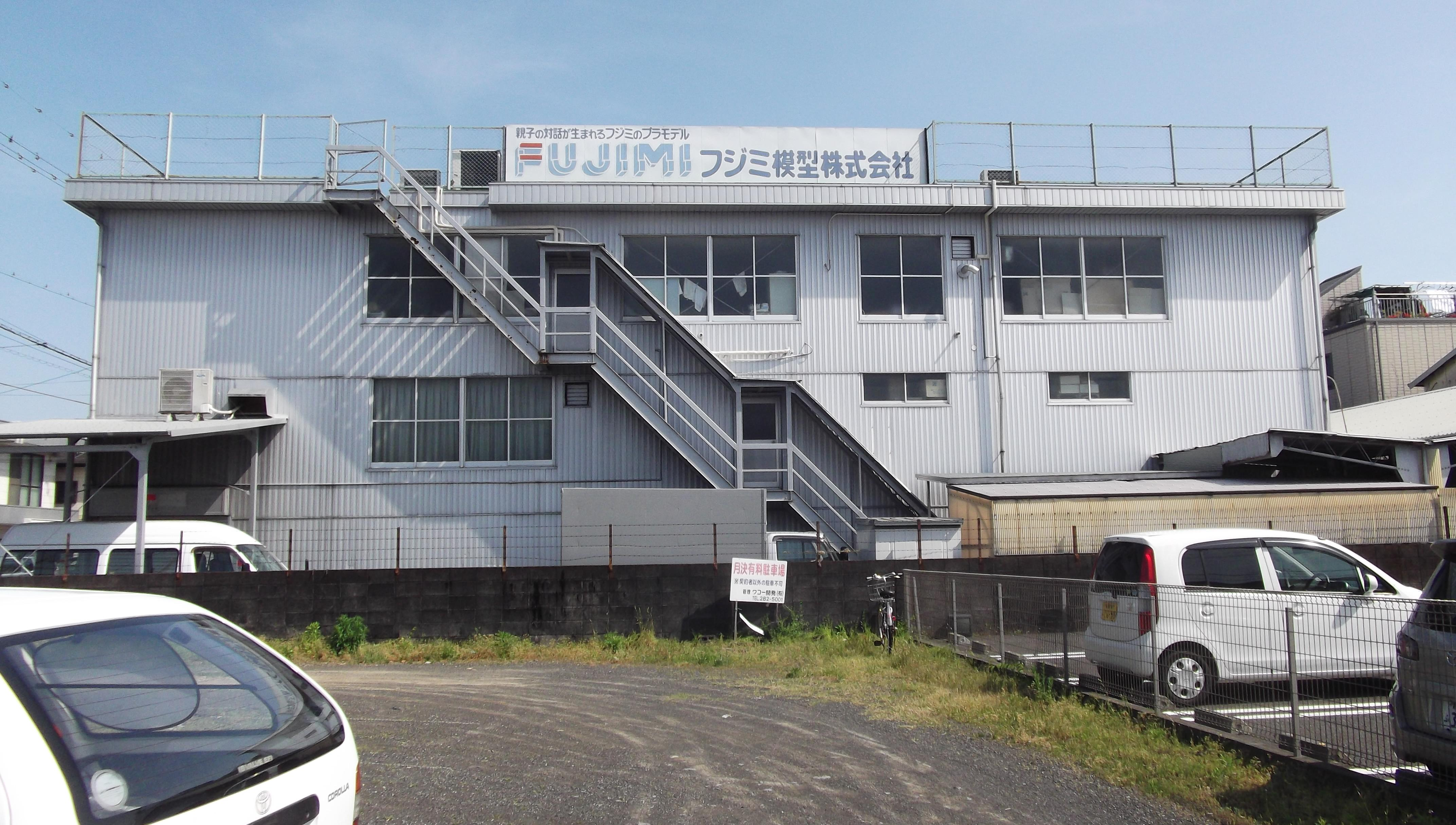 フジミ模型本社屋。静岡市駿河区登呂。